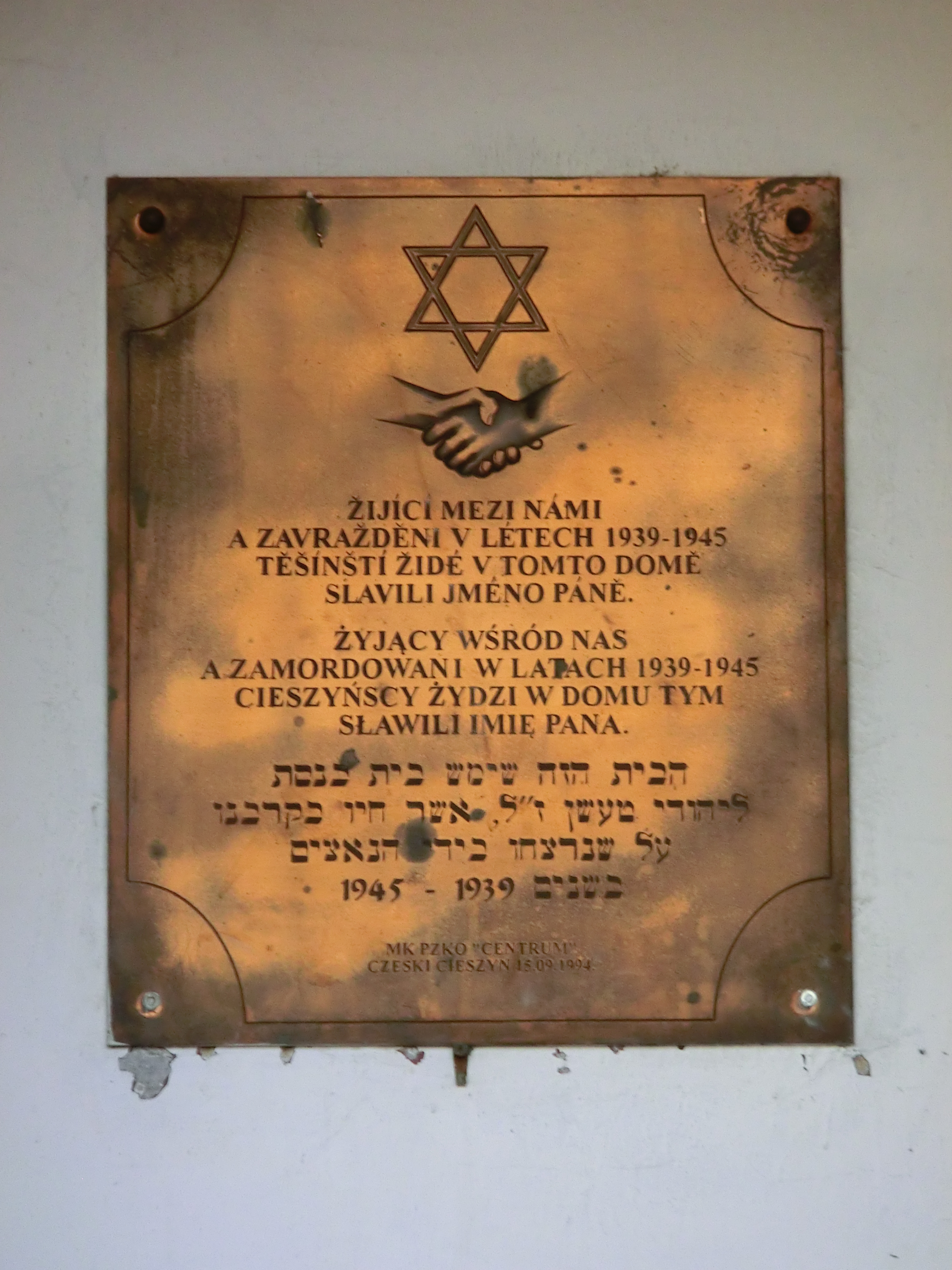 Synagoga bývalá (Český Těšín), Božkova 154/16, Český Těšín